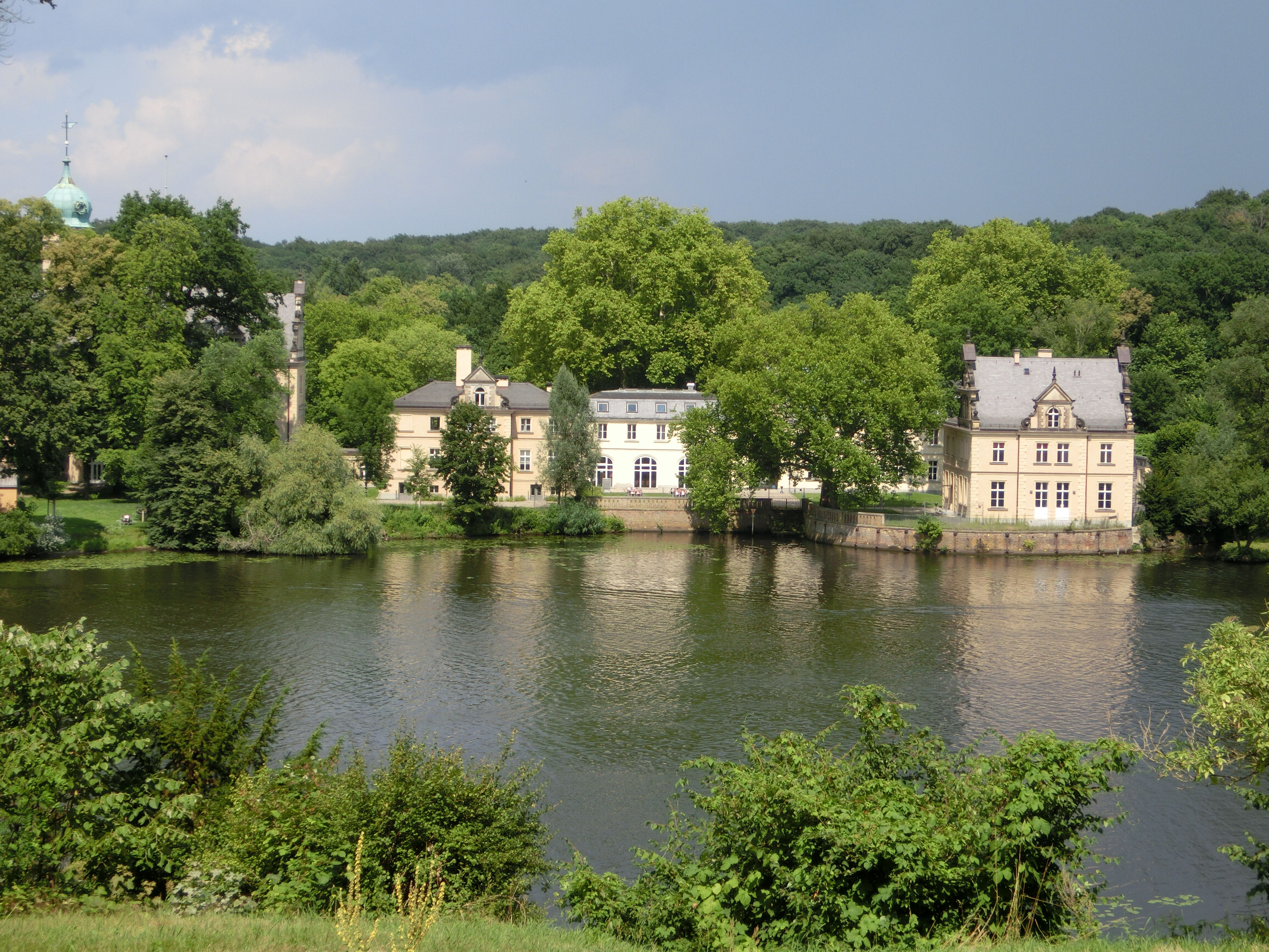 Jagdschloss Glienicke von Babelsberg aus Juli 2014